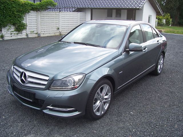 Novi facelift limuzine w204 avantgarde facelift